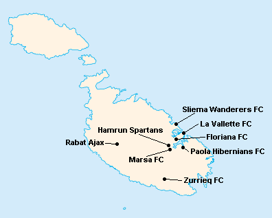 Répartition des clubs en Premier League Maltaise 1984-1985.